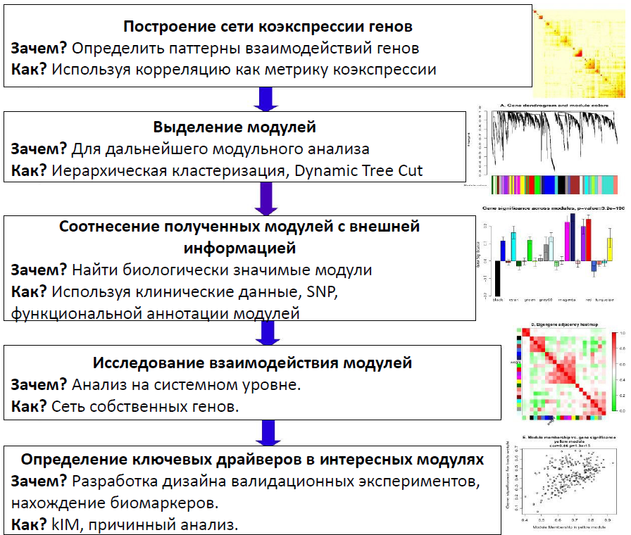 Представлена схема анализа сетей коэкспрессии генов с помощью WGCNA. Схема переведена на русский язык.